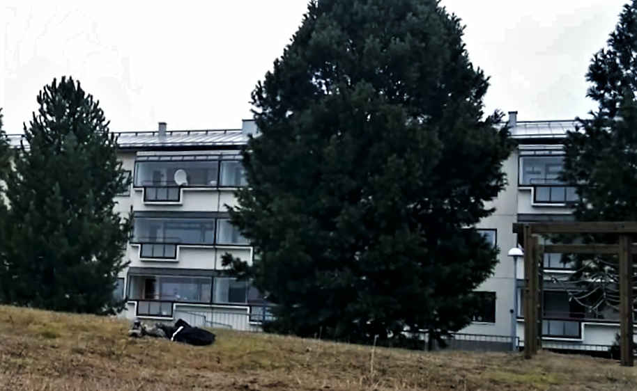 Kummatti marraskuussa 2012.